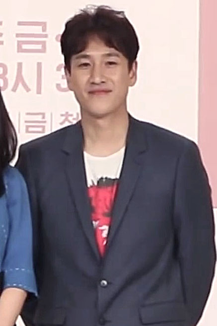 [TV10] 10월 26일 Jtbc '이번주 아내가 바람을 핍니다' 제작발표회 현장